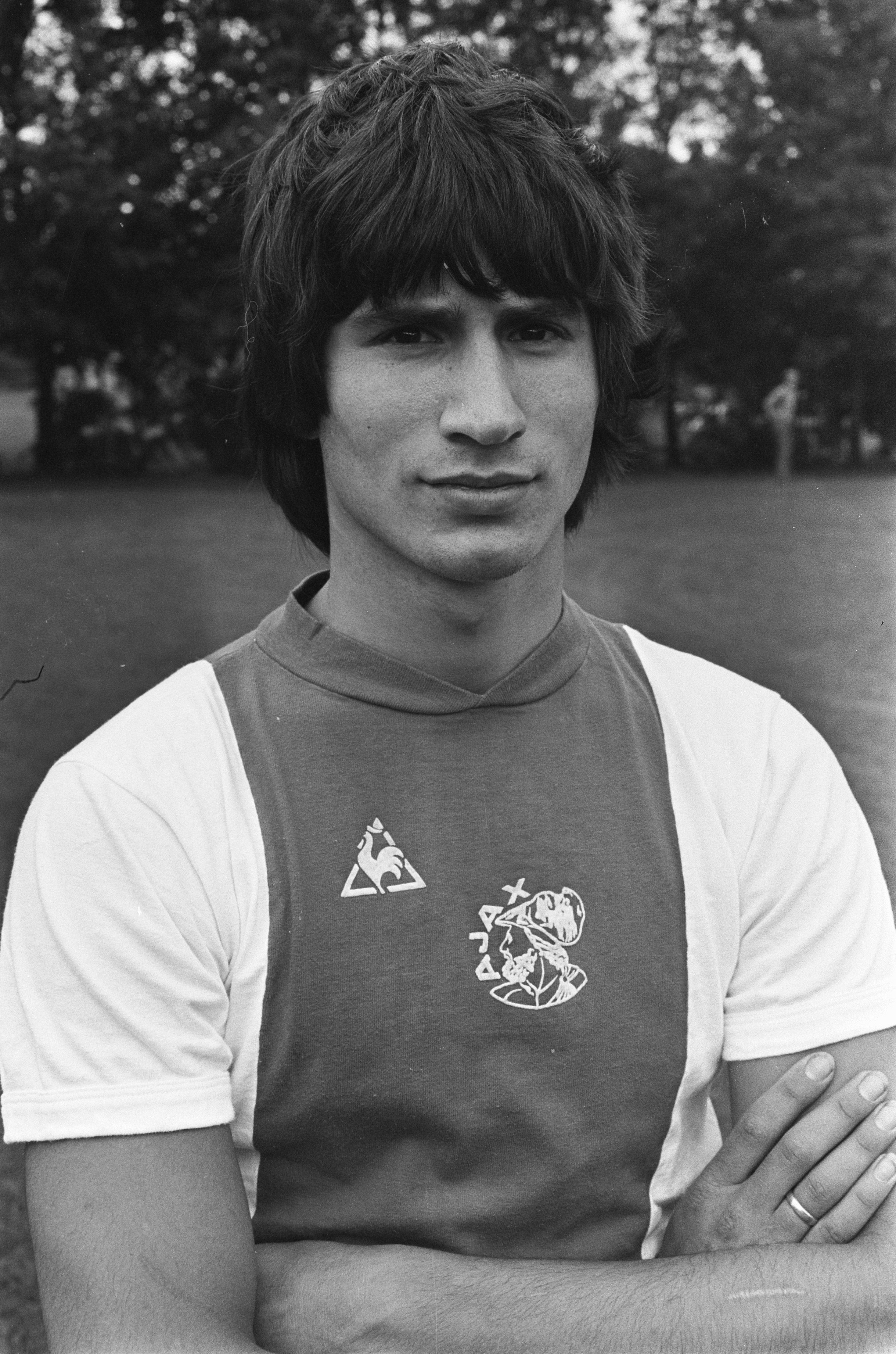 Collectie / Archief : Fotocollectie Anefo Reportage / Serie : Ajax presenteert de nieuwe selectie voor het aankomende voetbalseizoen 1975-1976 Beschrijving : Aanvaller Tscheu-la Ling Datum : 15 juli 1975 Locatie : Amsterdam, Noord-Holland Trefwoorden : portretten, sport, voetbal Persoonsnaam : Ling, Tscheu-la Instellingsnaam : AJAX Fotograaf : Bert Verhoeff / Anefo Auteursrechthebbende : Nationaal Archief Materiaalsoort : Negatief (zwart/wit) Nummer archiefinventaris : bekijk toegang 2.24.01.05 Bestanddeelnummer : 928-0507